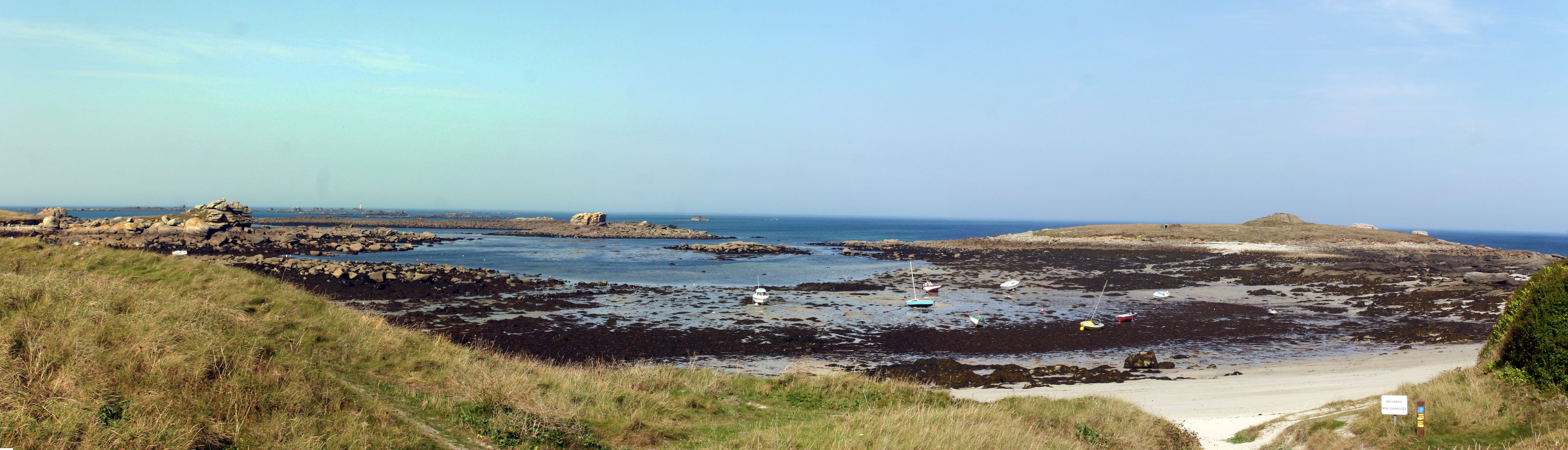 le sentier Côtier et l'Île Carn sur la droite- Ploudalmézeau- Finistére-France